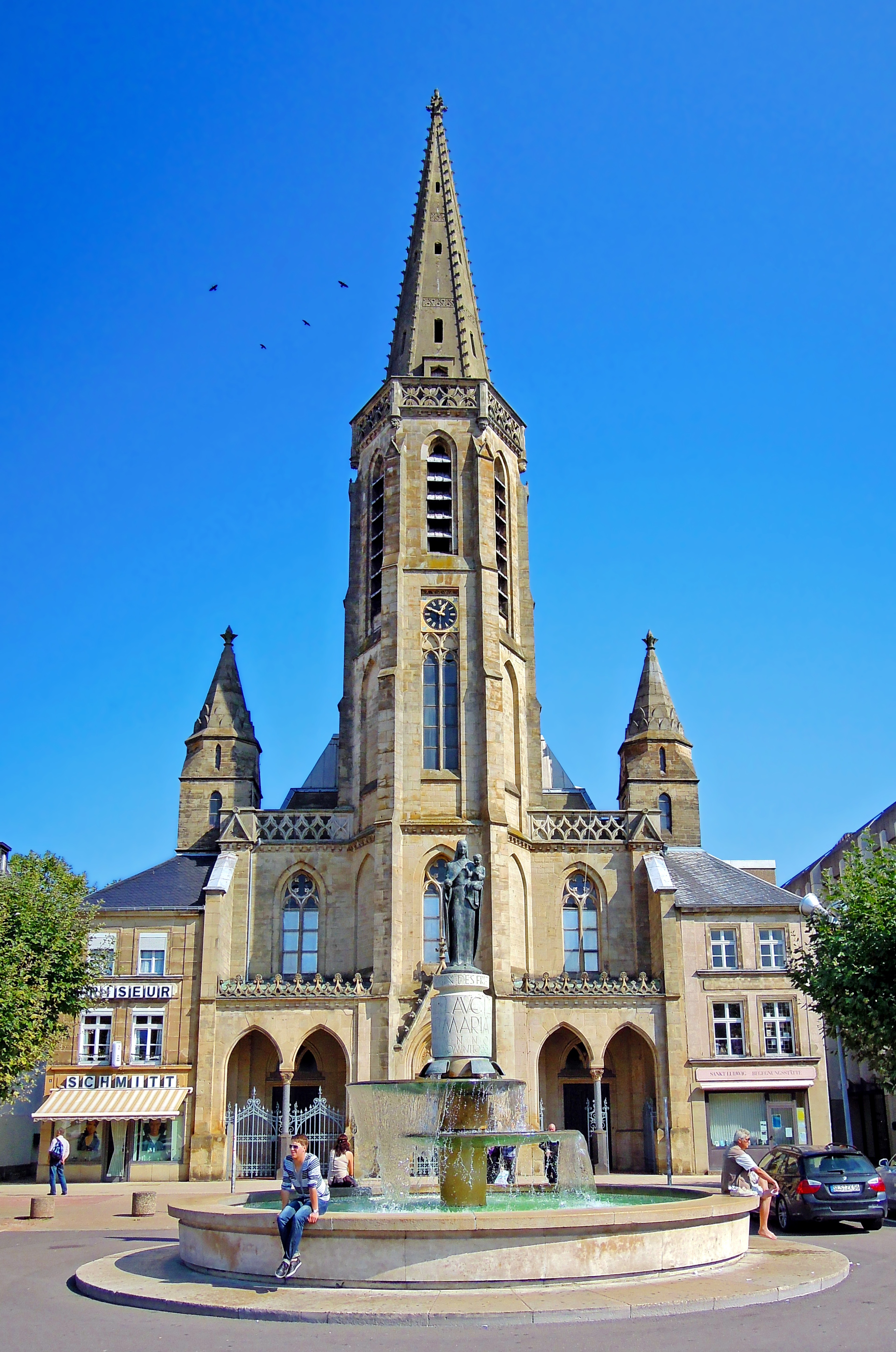 Großer Markt 5, kath. Pfarrkirche St. Ludwig (Einzeldenkmal)